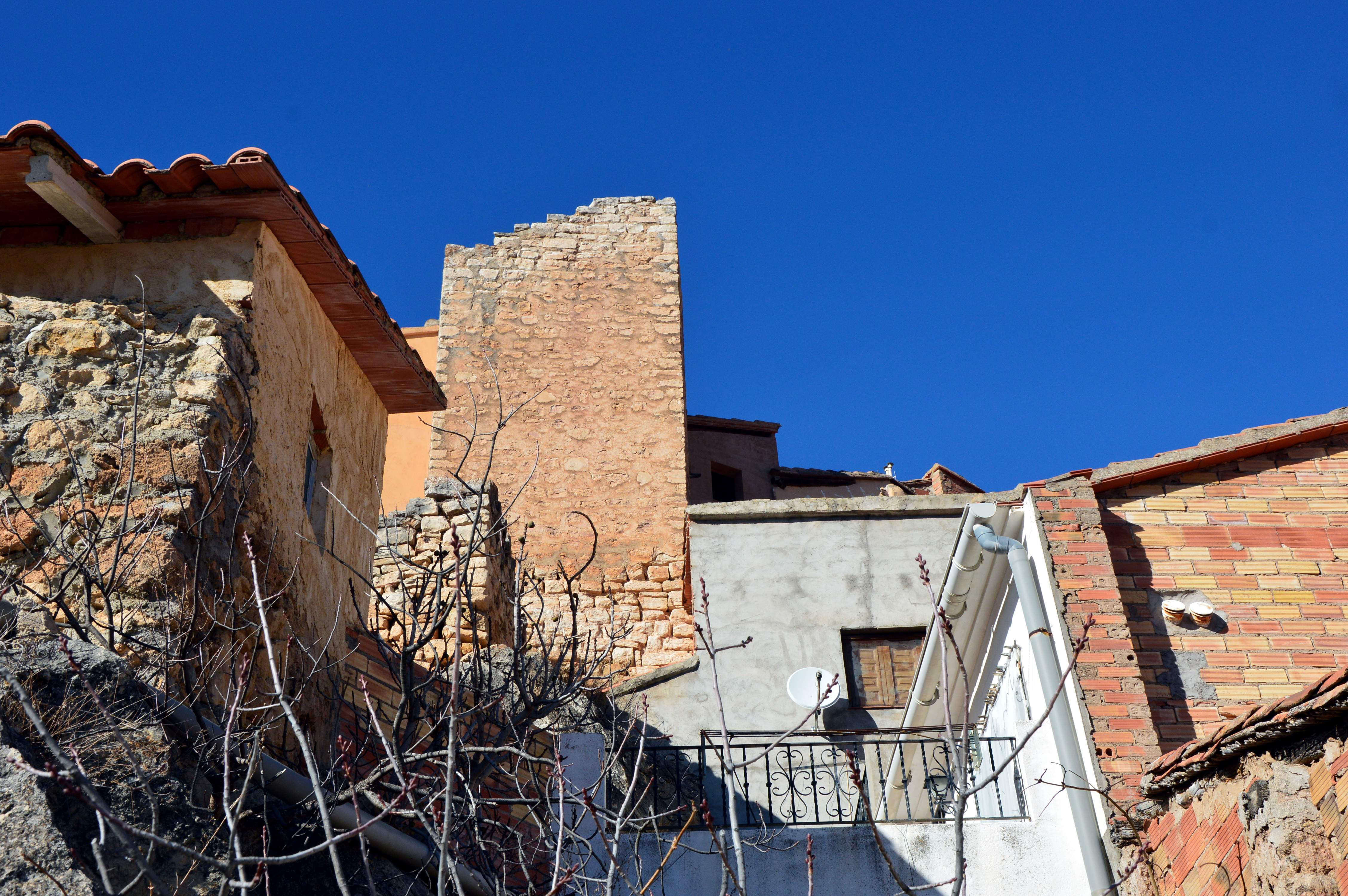 Paisaje urbano de Castielfabib (Valencia), con detalle del Torrejón, situada en el sector suroriental del recinto amurallado (2019).